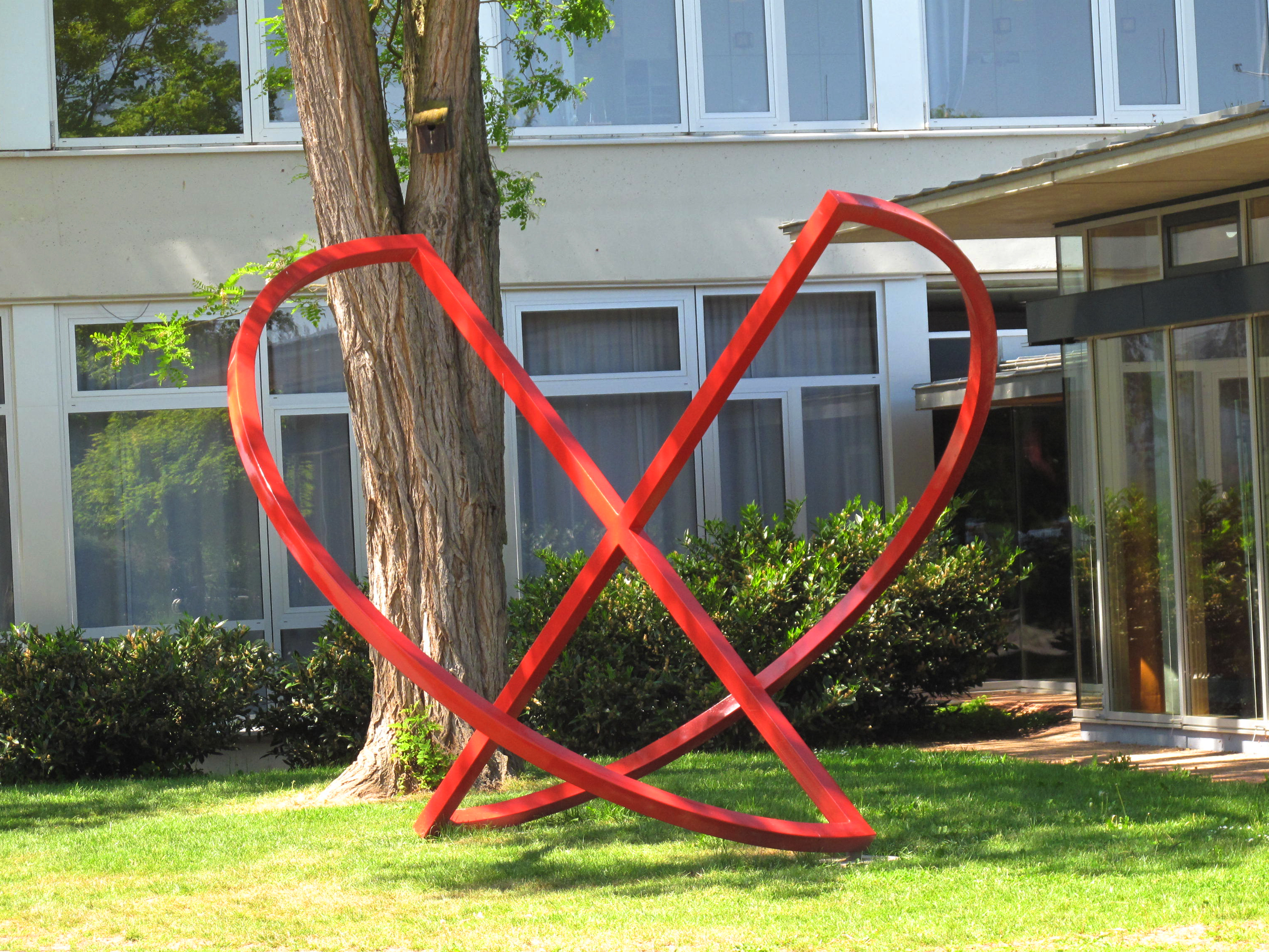 Kirchheimer Kunstweg: André Bucher, Gegenüberstellung, 1985, - Deutschland, Baden-Württemberg, Kirchheim/Teck (Stadtteil Ötlingen), Eduard-Mörike-Schule